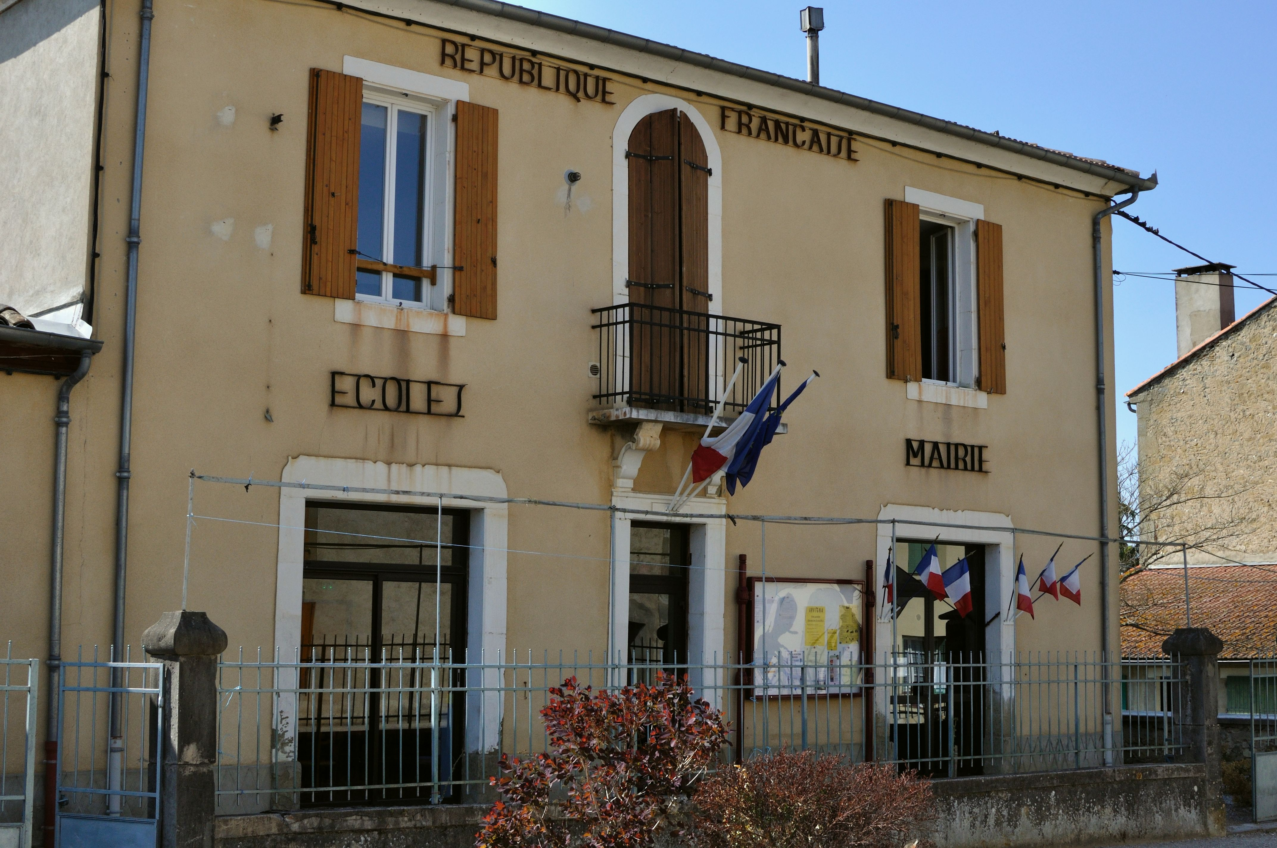 Mairie de Dun (Ariège, France)